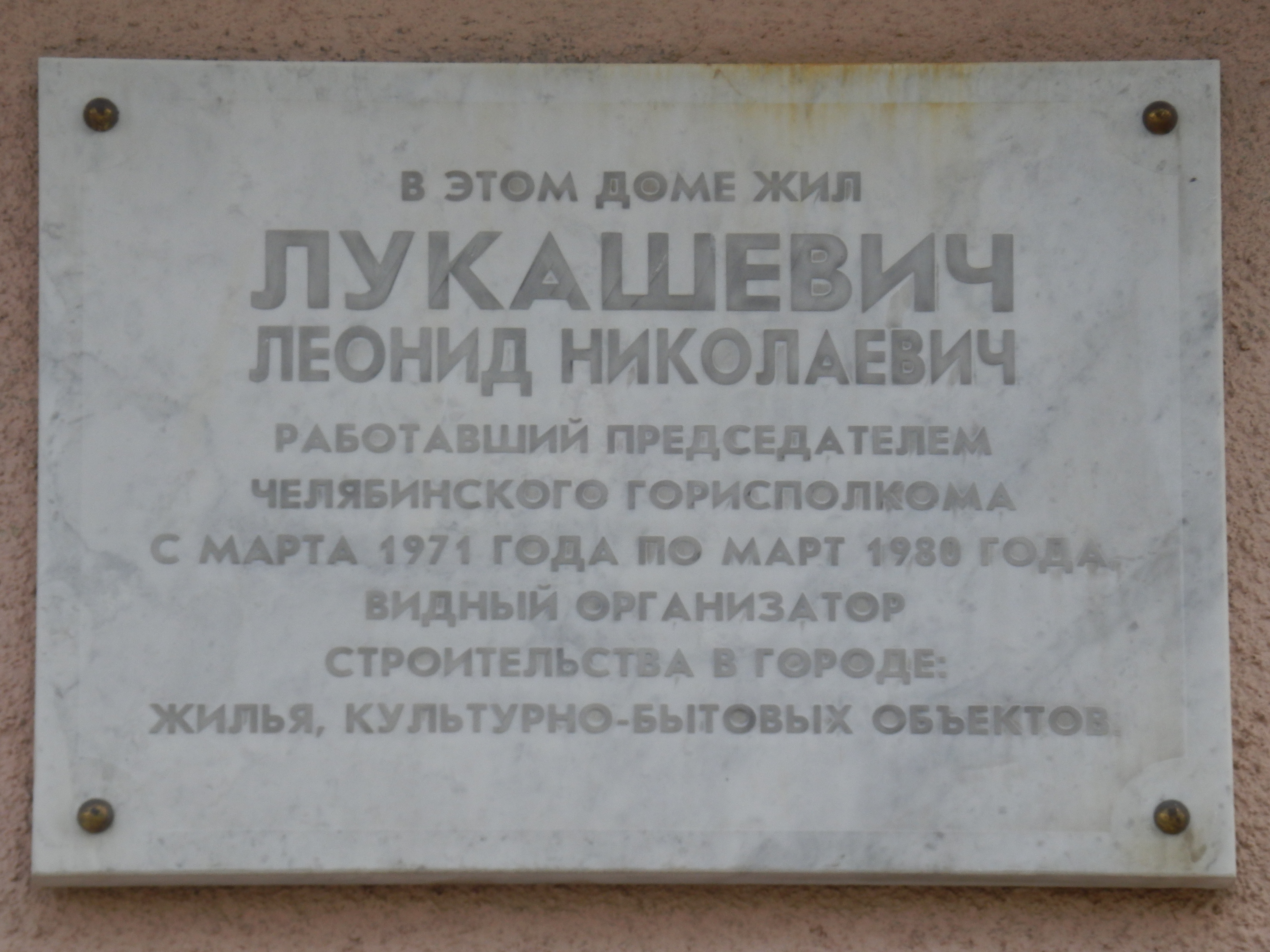 Памятная доска председателю Челябинского горисполкома, организатору массового строительства в городе Лукашевичу Леониду Николаевичу на фасаде дома, где он жил, по адресу: г. Челябинск, проспект Ленина, 73 (на фасаде со стороны проспекта у пересечения с улицей Энгельса